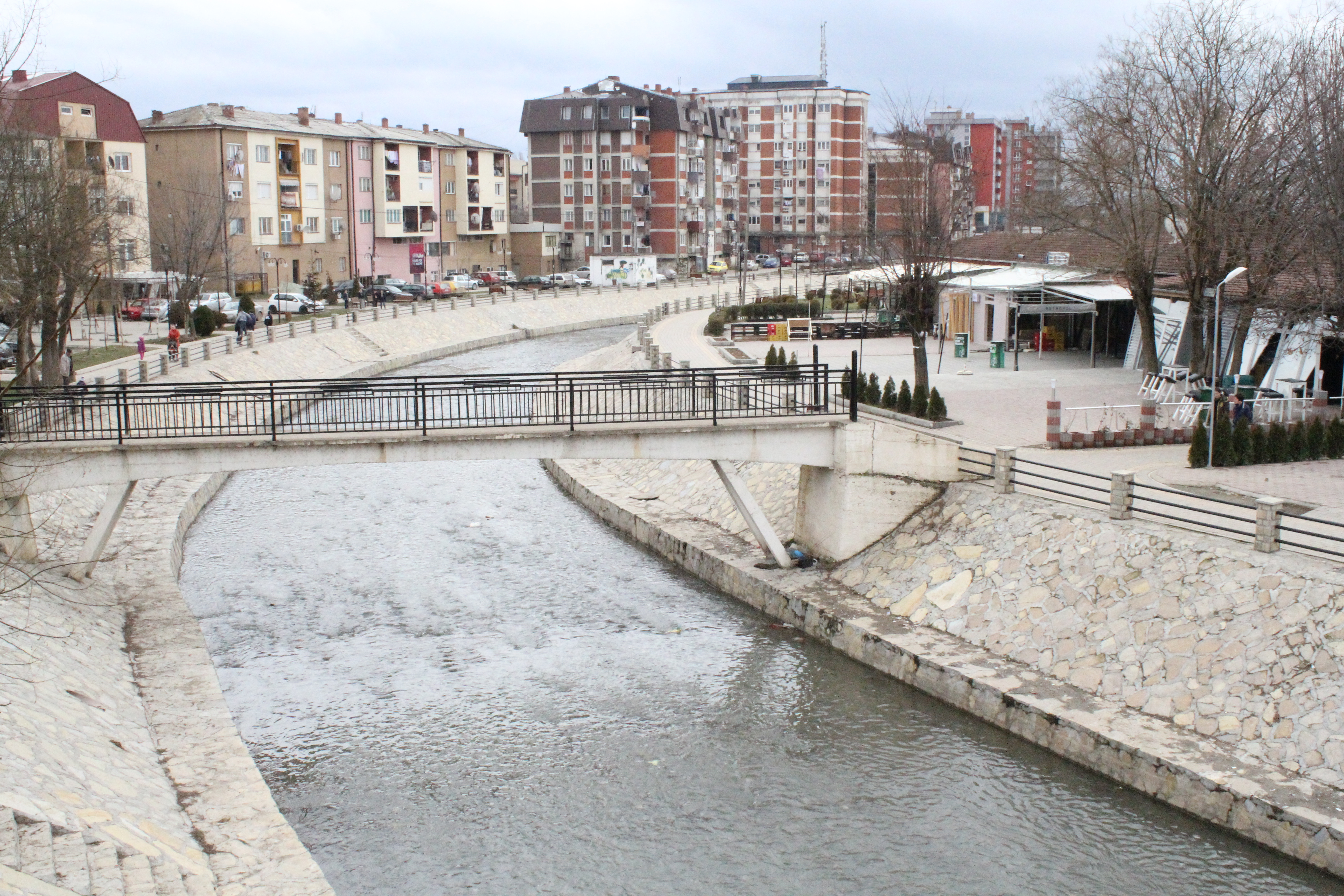 Pamje e Lumit LLap